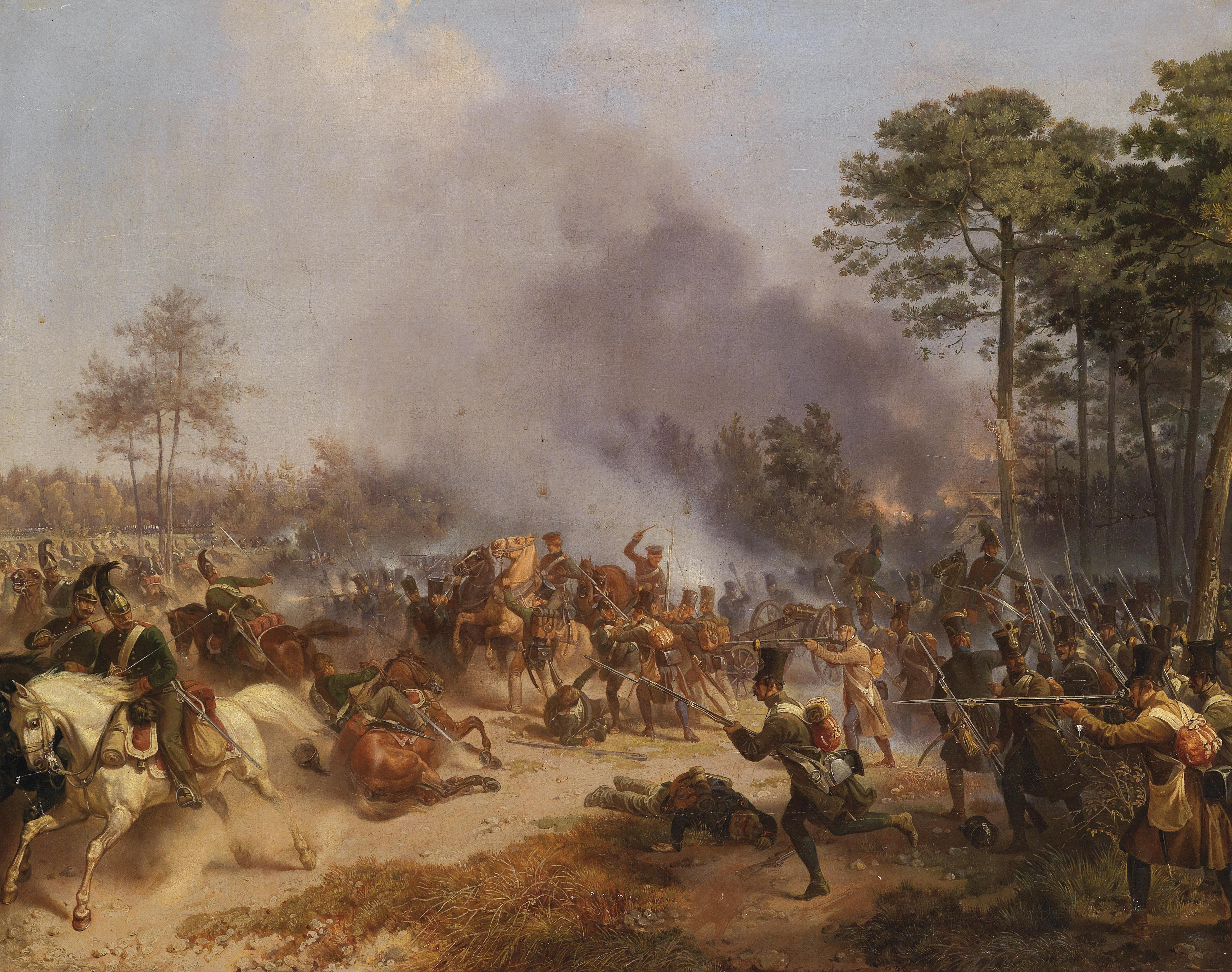 Gefecht österreichischer Infanterie-Truppen (Hilfscorps im Dienste Napoleons) gegen Russische Artellerie und Dragoner 1812